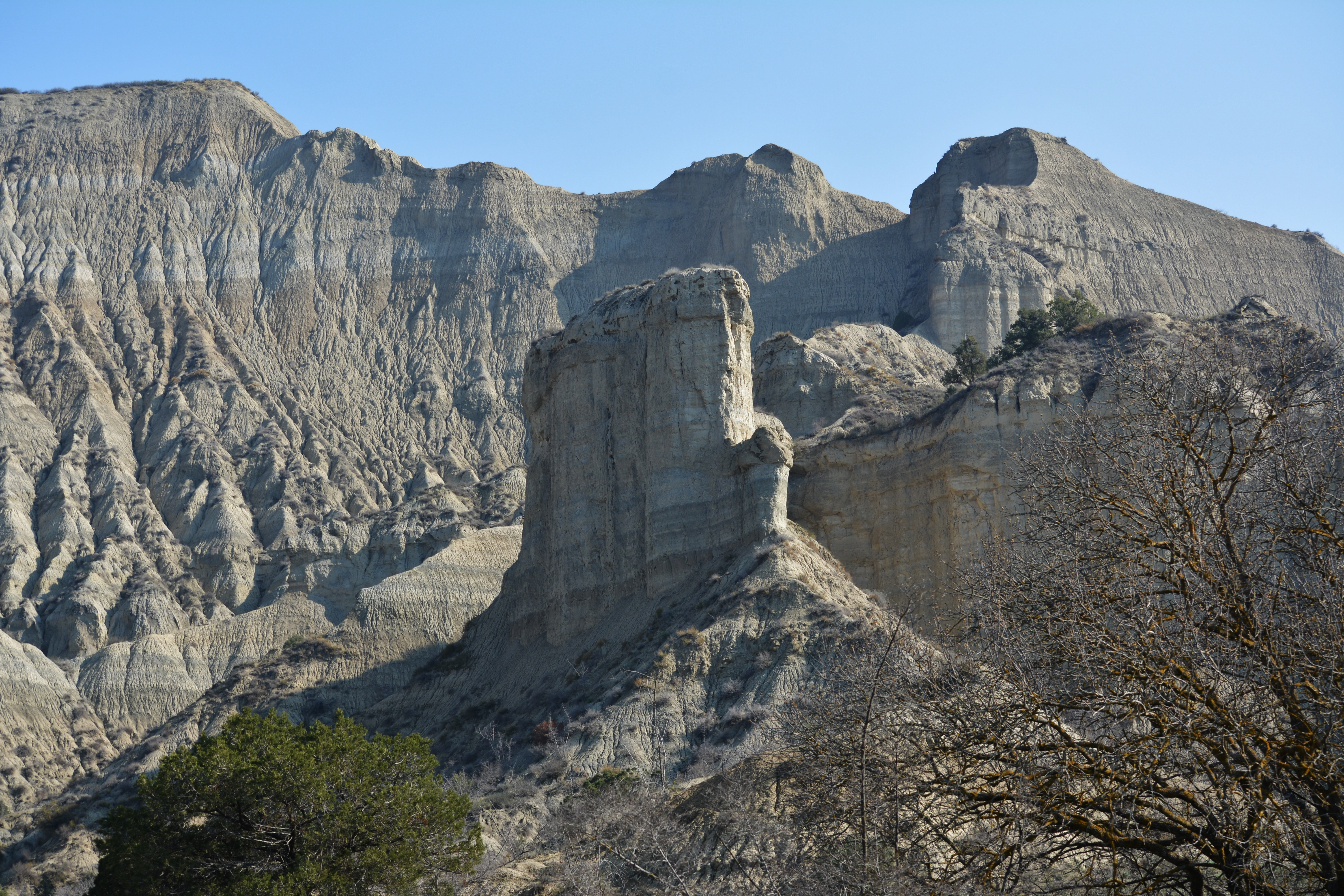 Qax Dövlət Təbiət Yasaqlığı